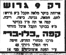 פרסומת בעיתון הארץ 1947